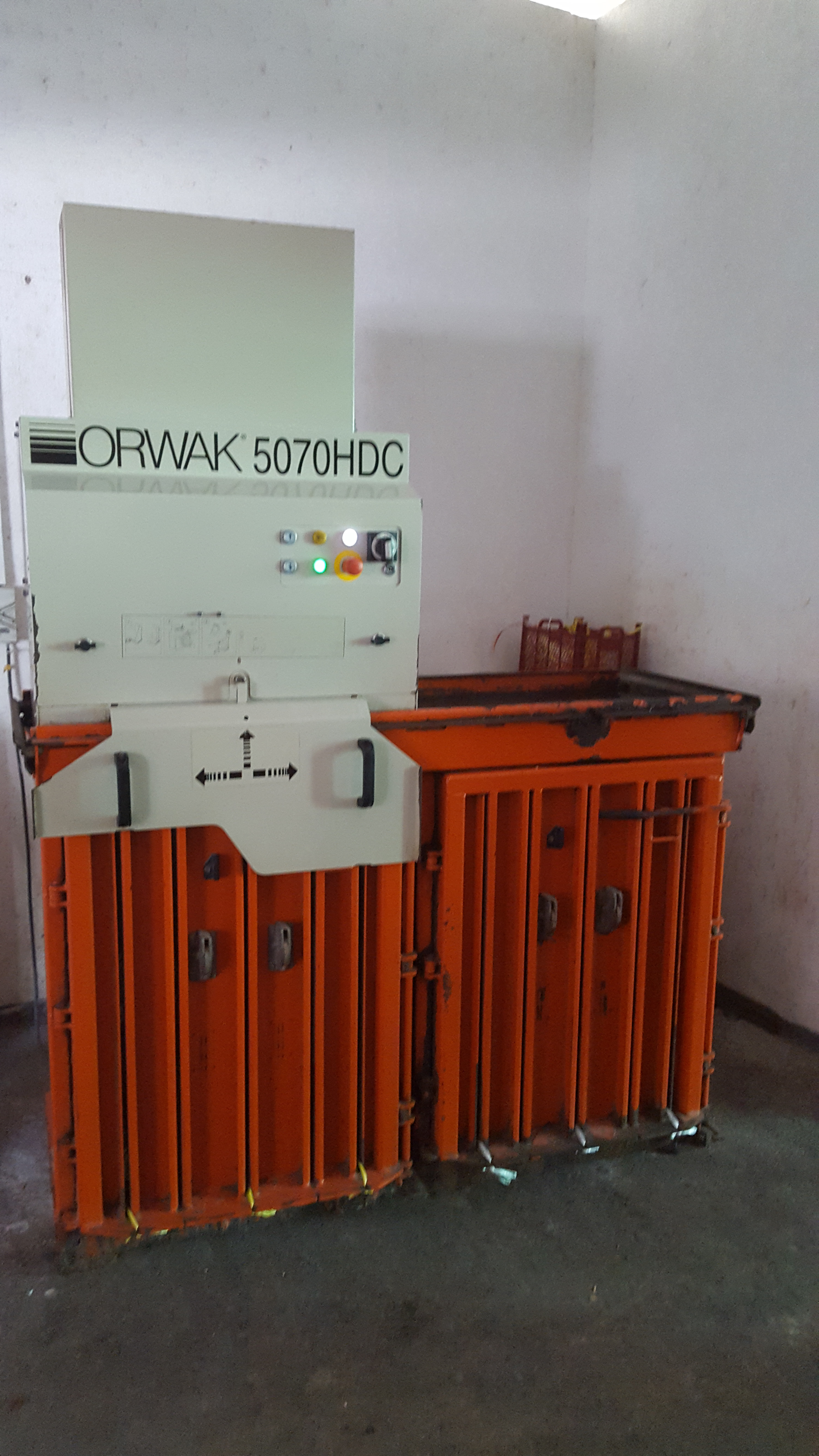 Die Müllpresse Orwak 5070HDC komprimiert sortierten Müll wird in Quader (50cm x 70cm x 85cm)